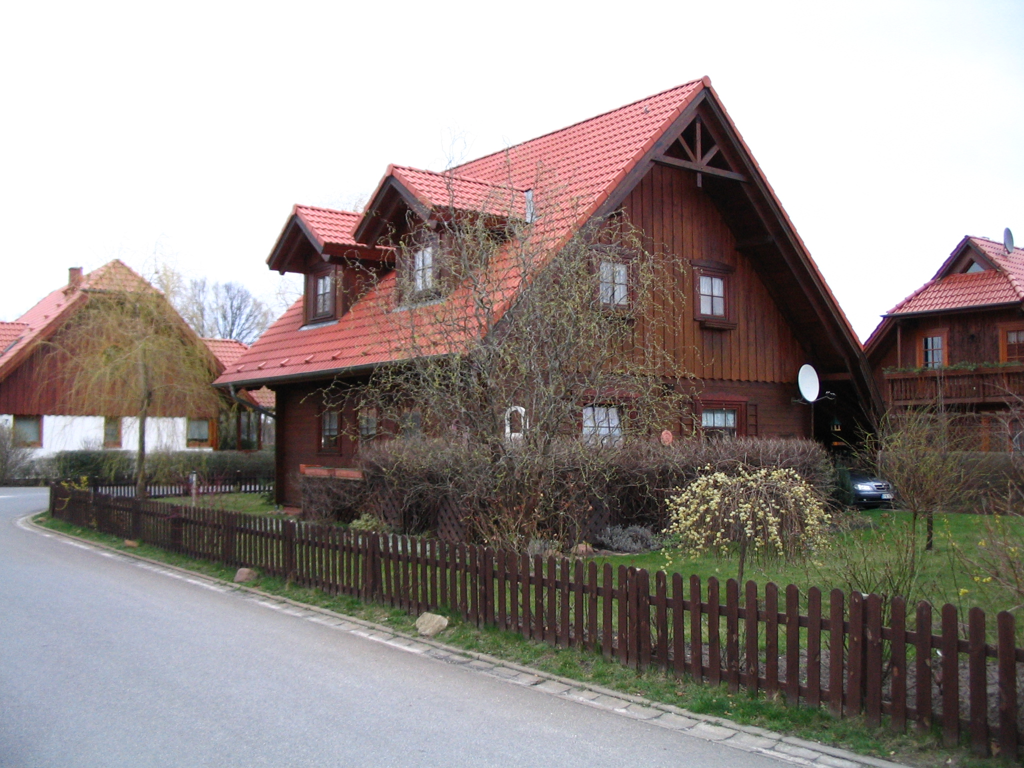 Typisches Blockhaus in Maust, einer der größten zusammenhängenden Blockhaussiedung Deutschlands.